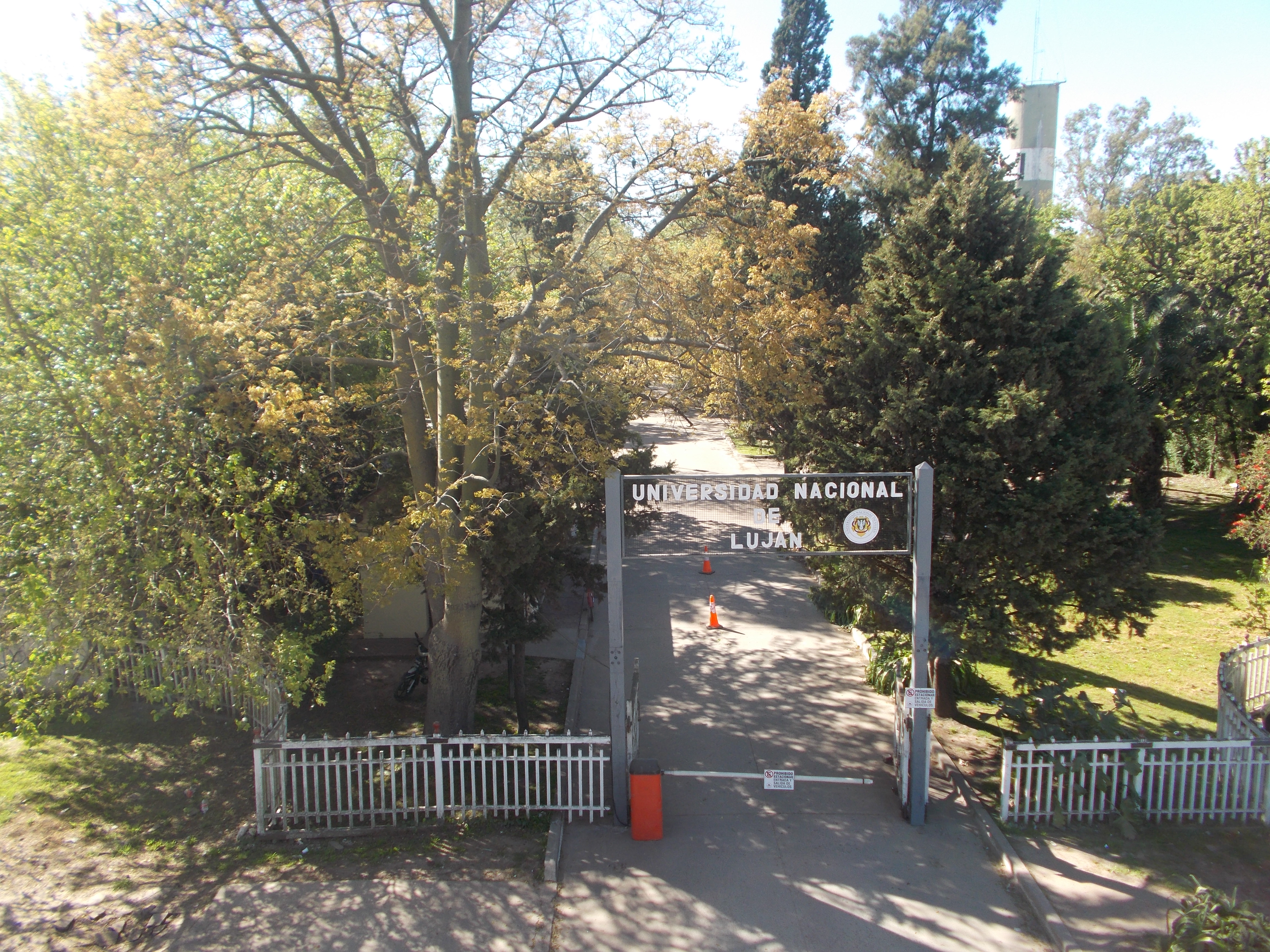 Portón de ingreso principal a la sede central de la Universidad Nacional de Luján.